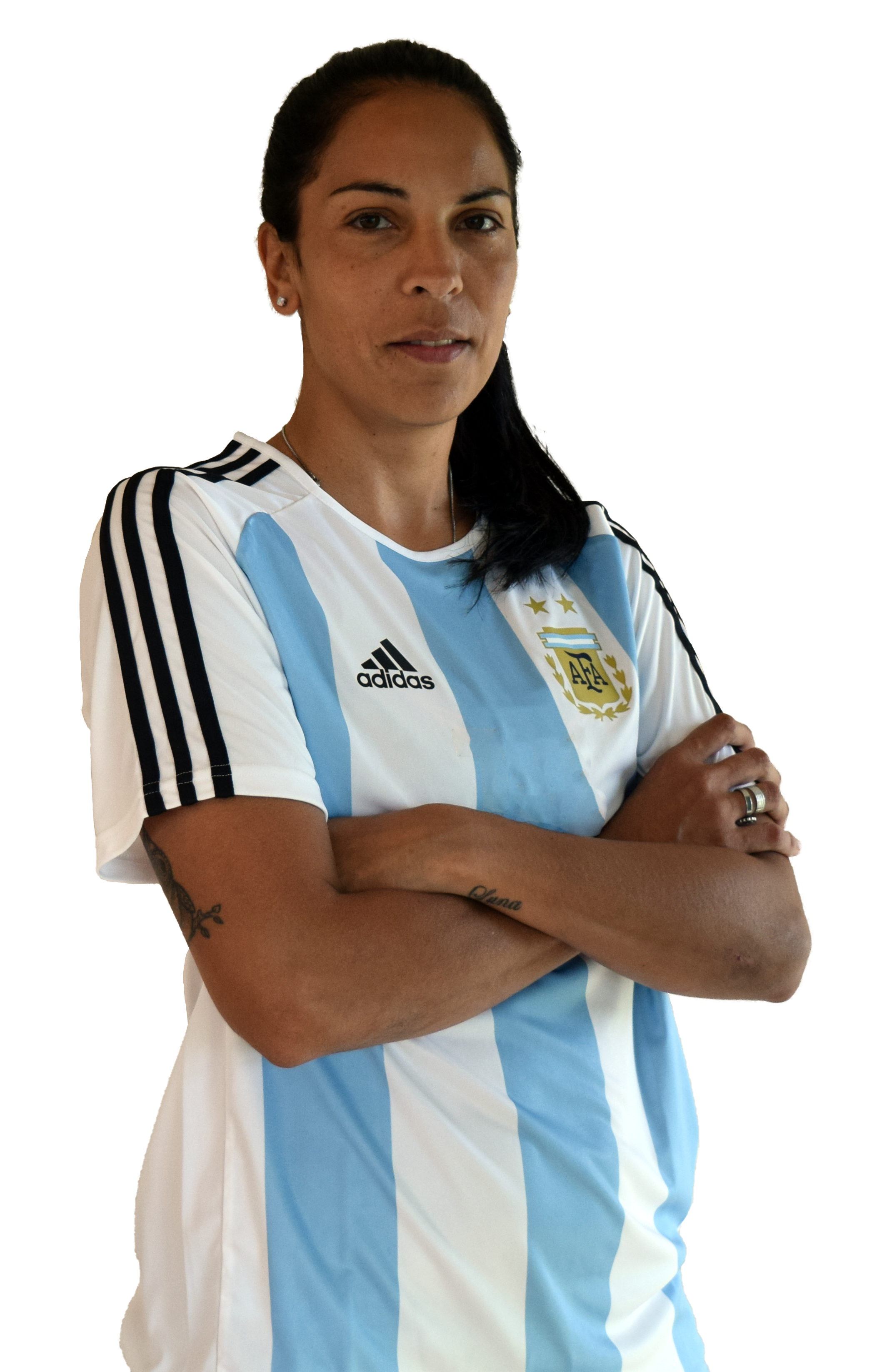 Vanina Correa, jugadora de la selección mayor femenina de fútbol de Argentina.Foto sacada previo al primer partido del repechaje por un lugar para el mundial de futbol femenino de Francia 2019